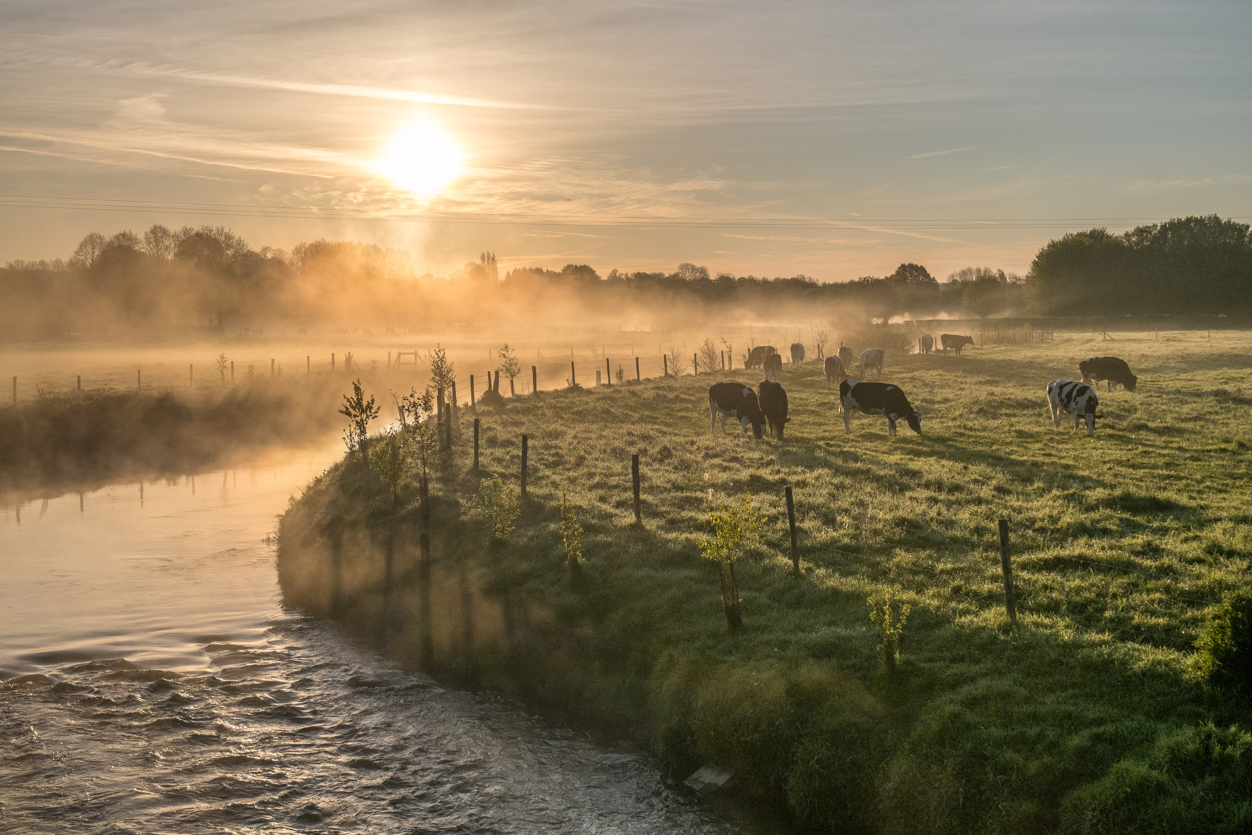 Rituelle brume du petit jour en Avesnois.